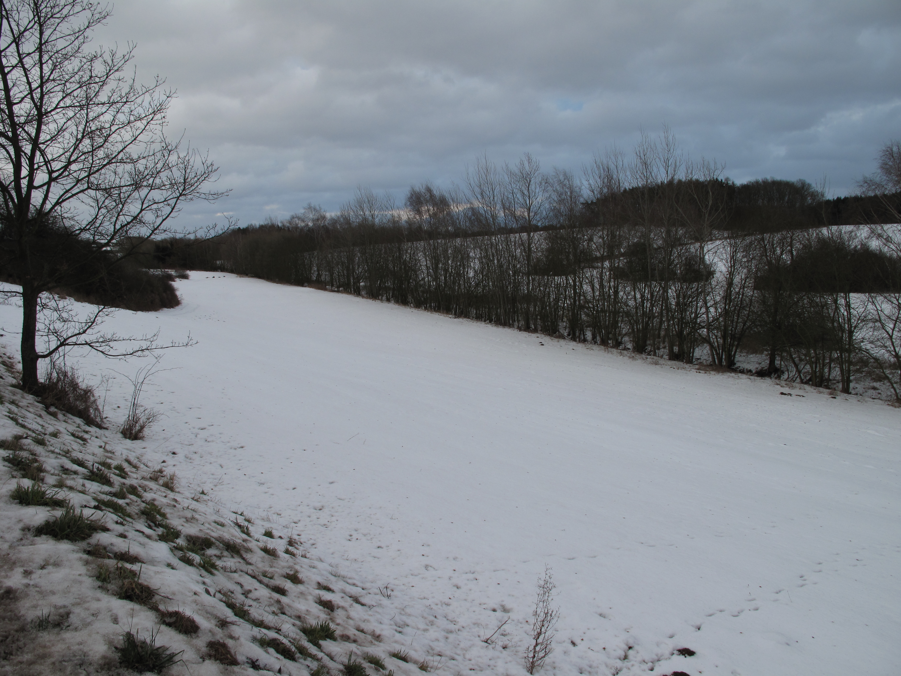 Budkovský potok. Okres Benešov, Česká republika.